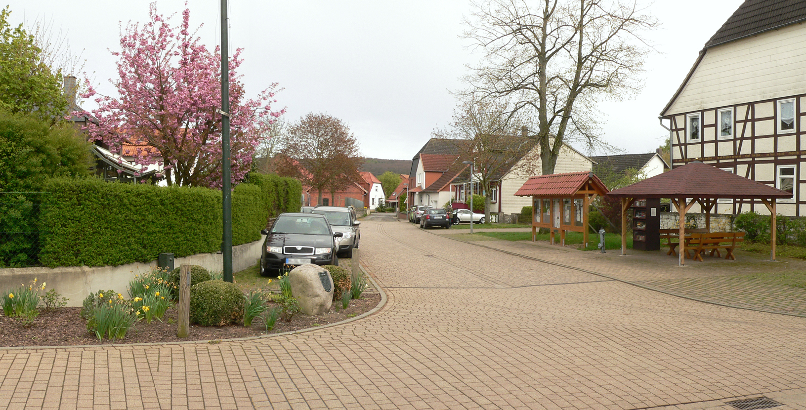 Straßenansicht am Thie in Adensen